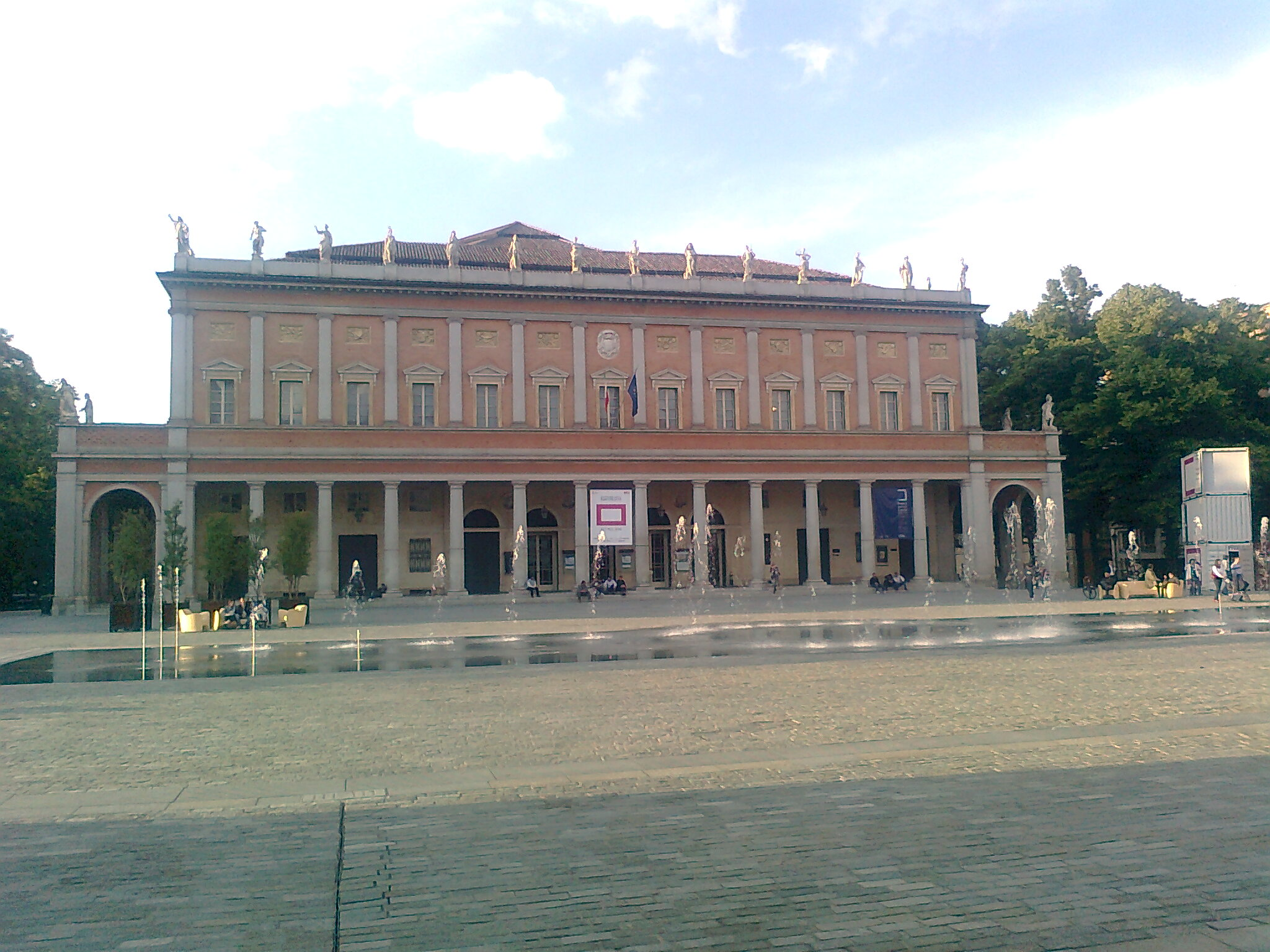 Il Teatro Municipale Romolo Valli a Reggio Emilia